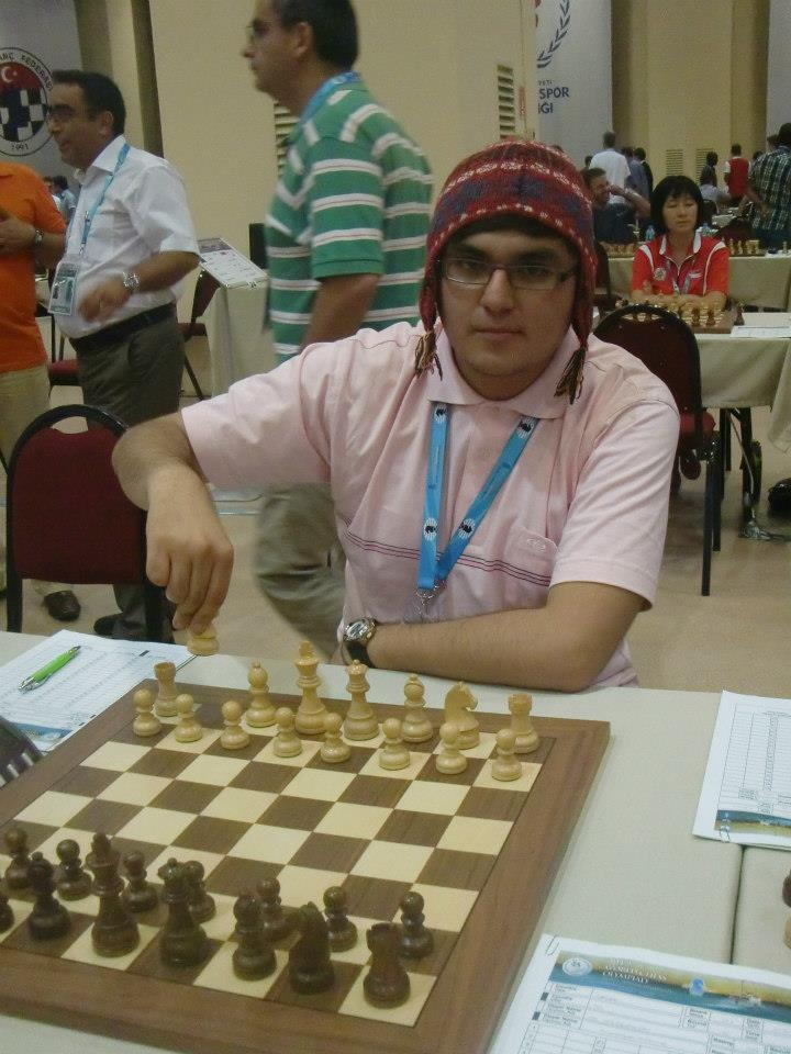 MI Deivy Vera en Olimpiadas de Ajedrez Estambul 2012.